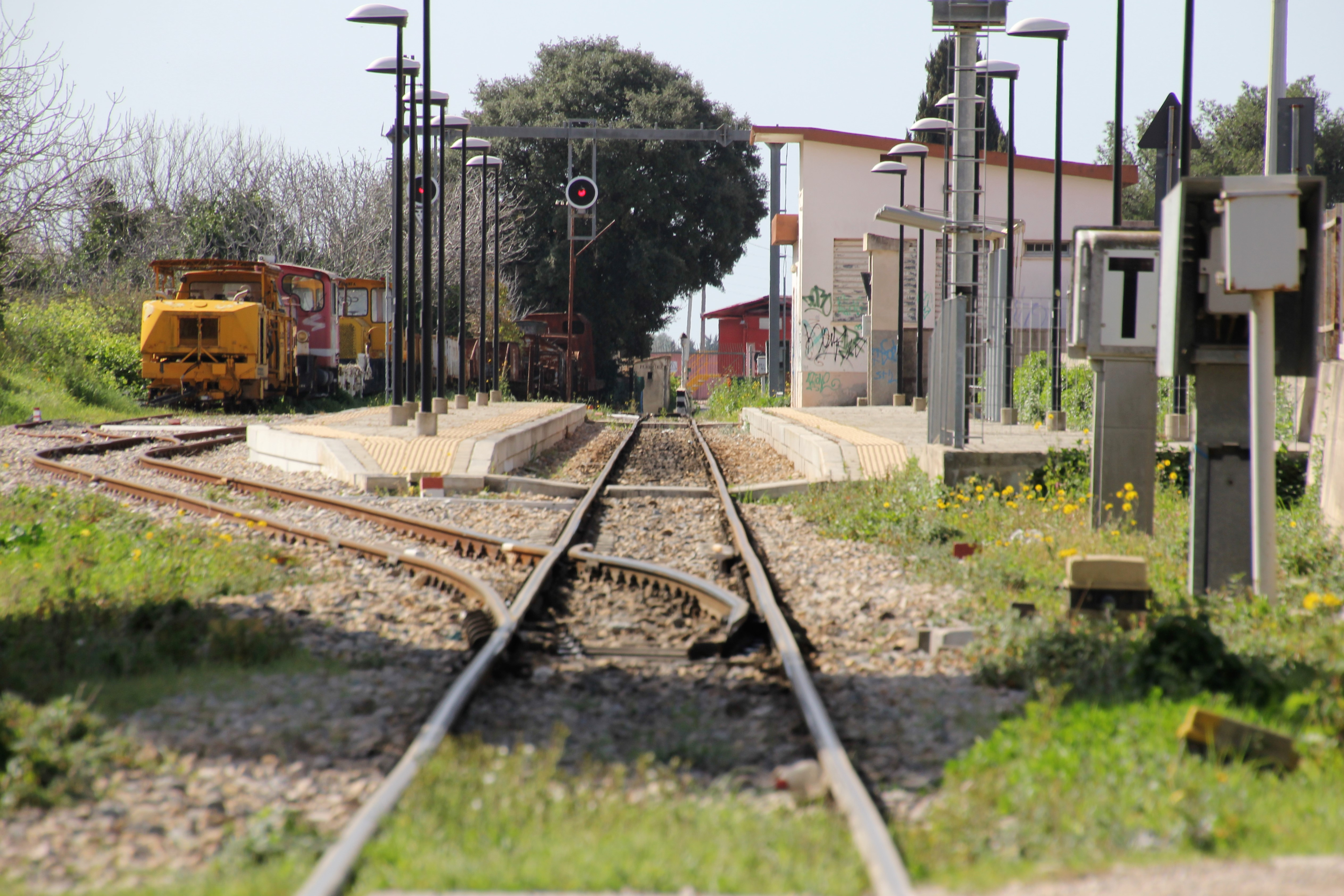 Sassari, stazione ferroviaria di Sassari Santa Maria